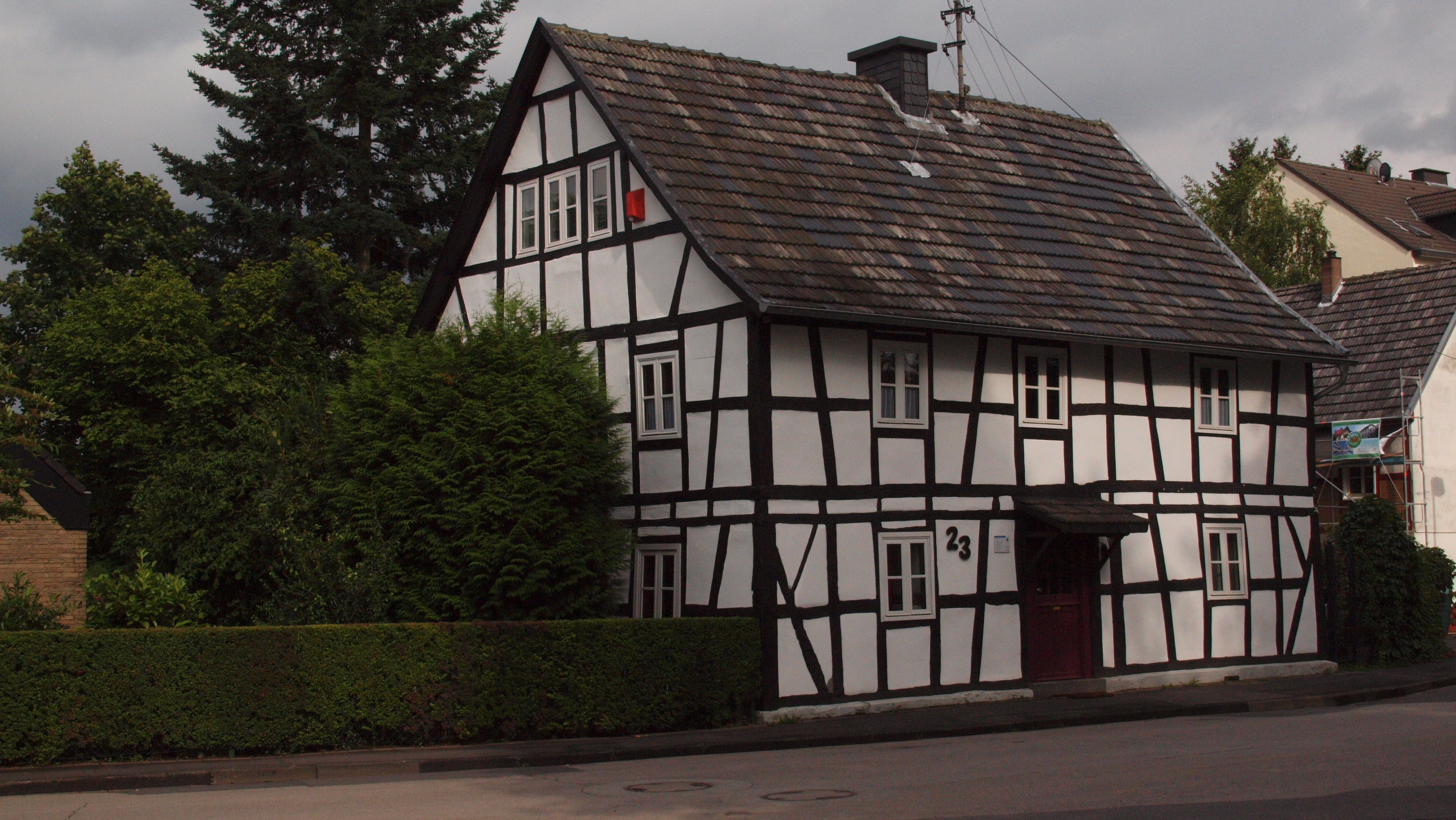 Denkmalgeschütztes Fachwerkhaus, Siegfeldstraße 23, Hennef (Sieg)